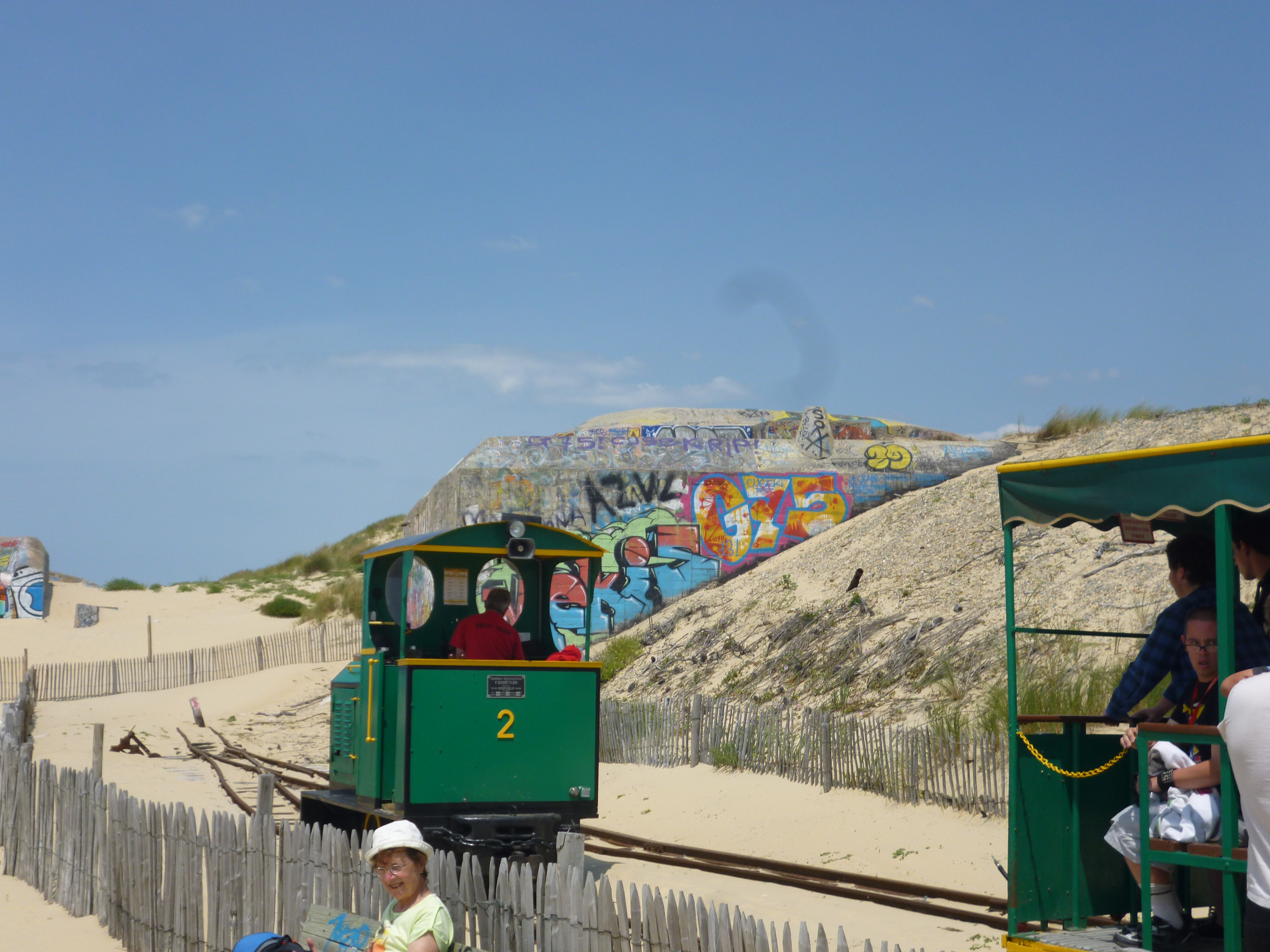 Tramway du Cap-Ferret an der westlichen Endstation Plage de L'Horizon